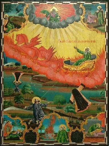 Вознесение святого Илии. 1831 г. Болгария. Неизвестный иконописец .